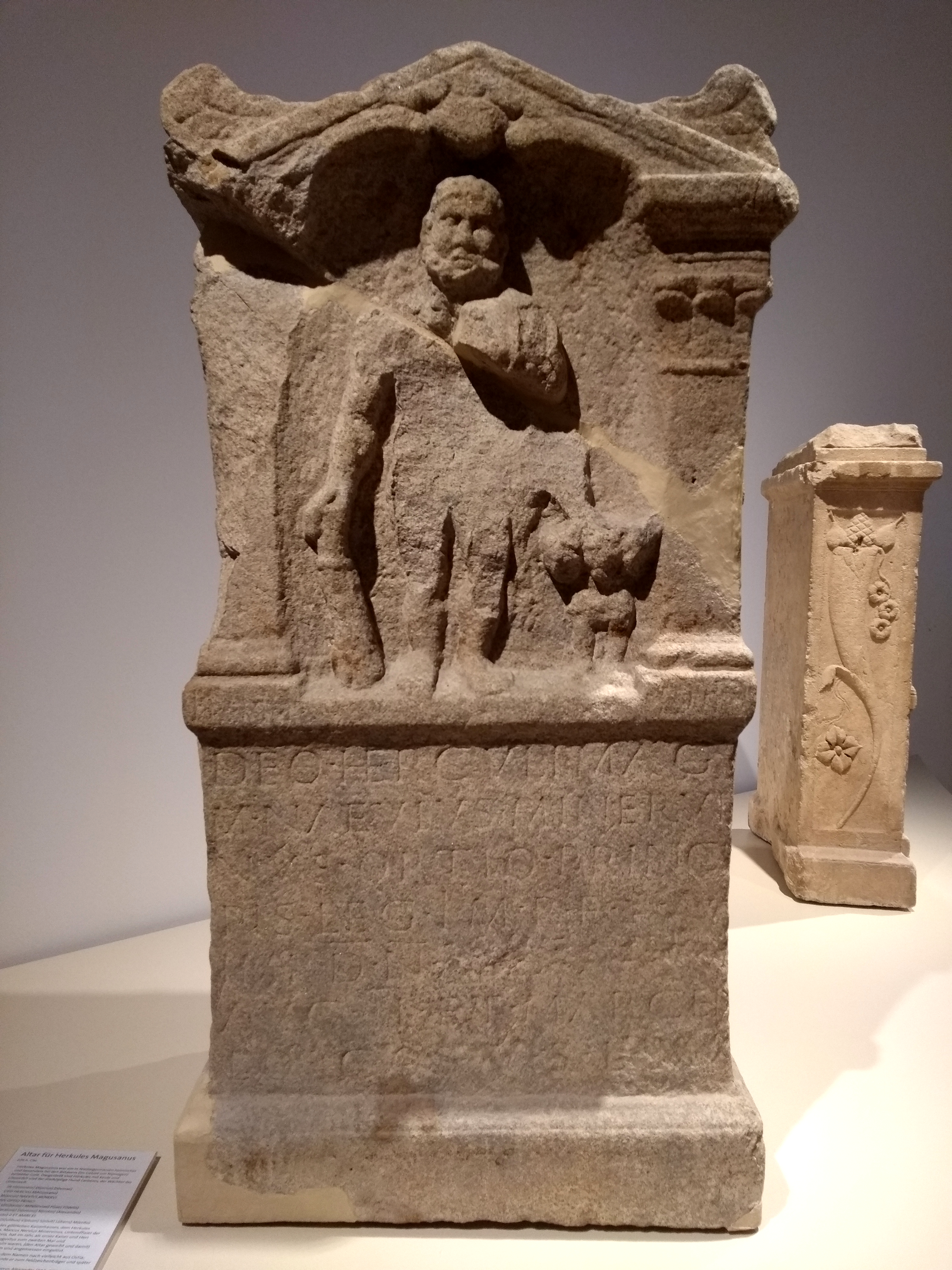 Altar für Hercules Magusanus im Rheinischen Landesmuseum Bonn (AE 1971,282)